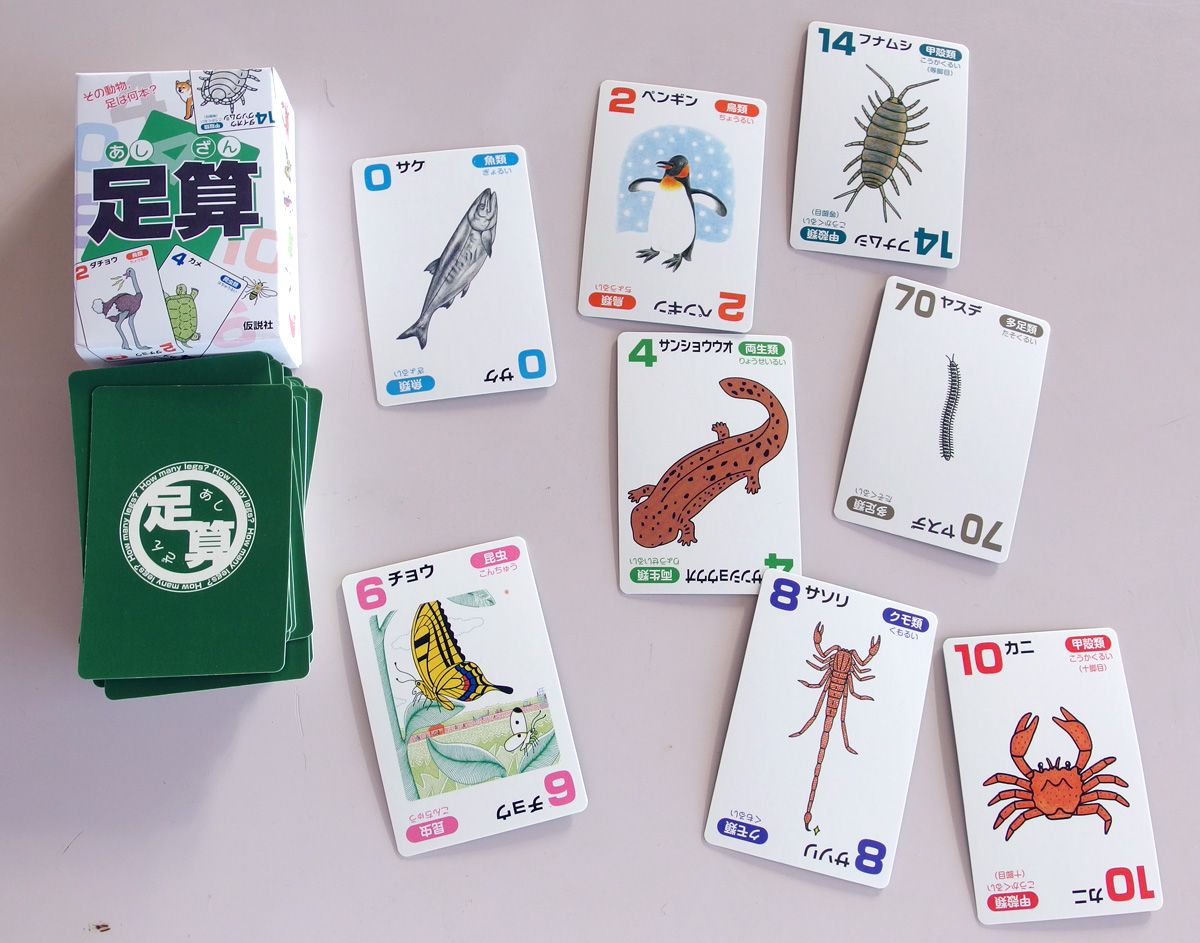 淀井泉が2010年に考案したカードゲーム。動物の絵と足の数が書いてるカードを用いて，神経衰弱のようにカードをめくる。足の合計は10になったらカードをもらえる。10を超えたら次の人に移る。